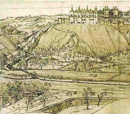 Vista de Madrid: dibujo preparatorio (1562). Anton Van der Wyngaerde (fragmento con el Real Alcázar Real y la Casa de Campo)